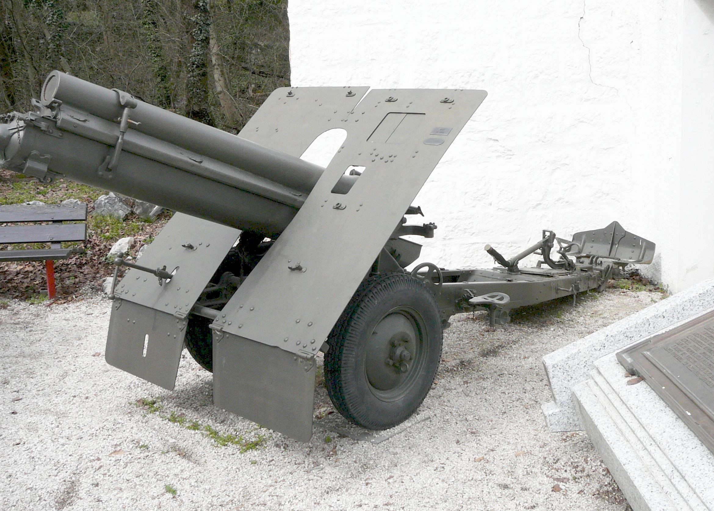 Obice 100/17 mod 1914 Museo storico degli Alpini